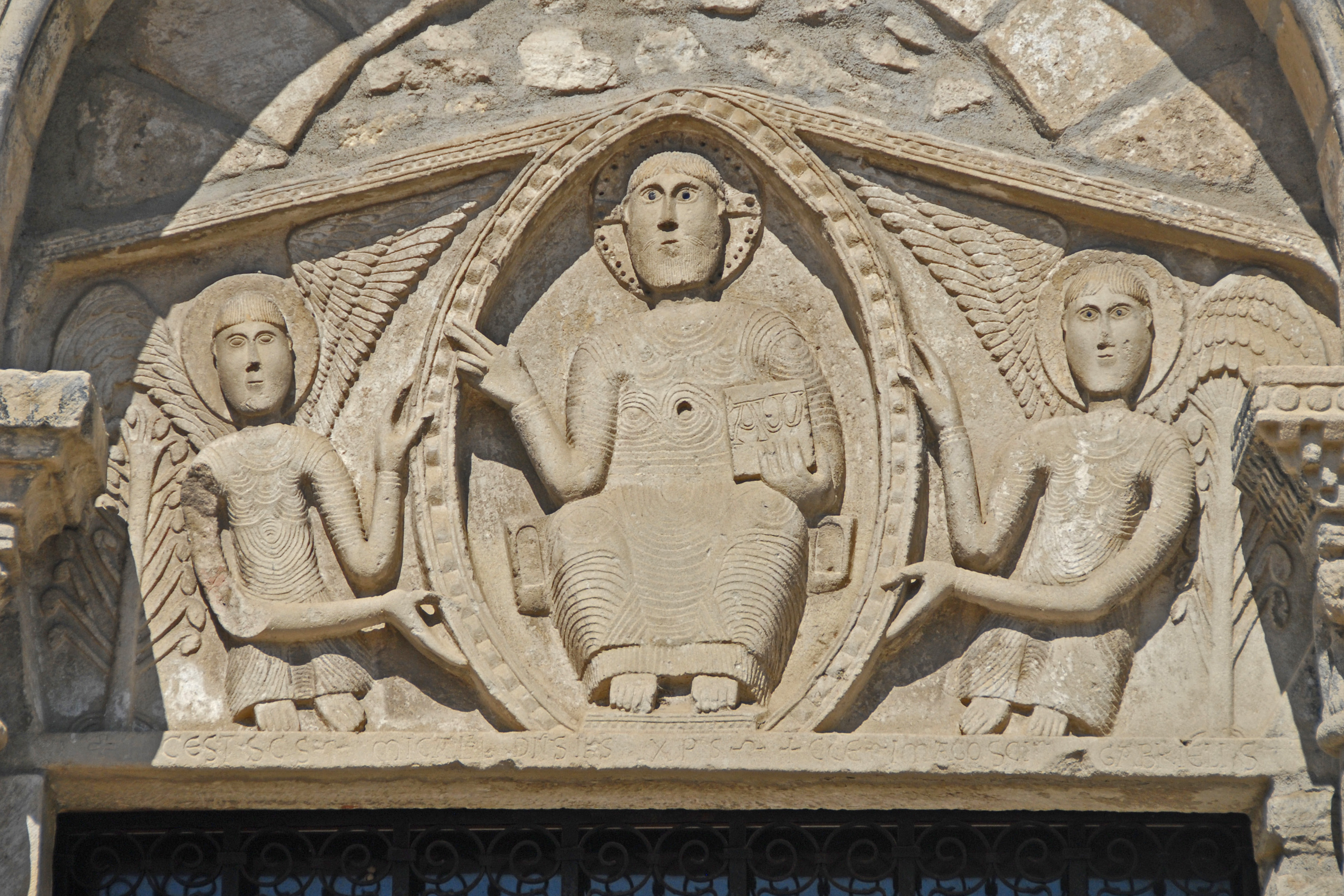 Thuret, Auvergne, Mandorla